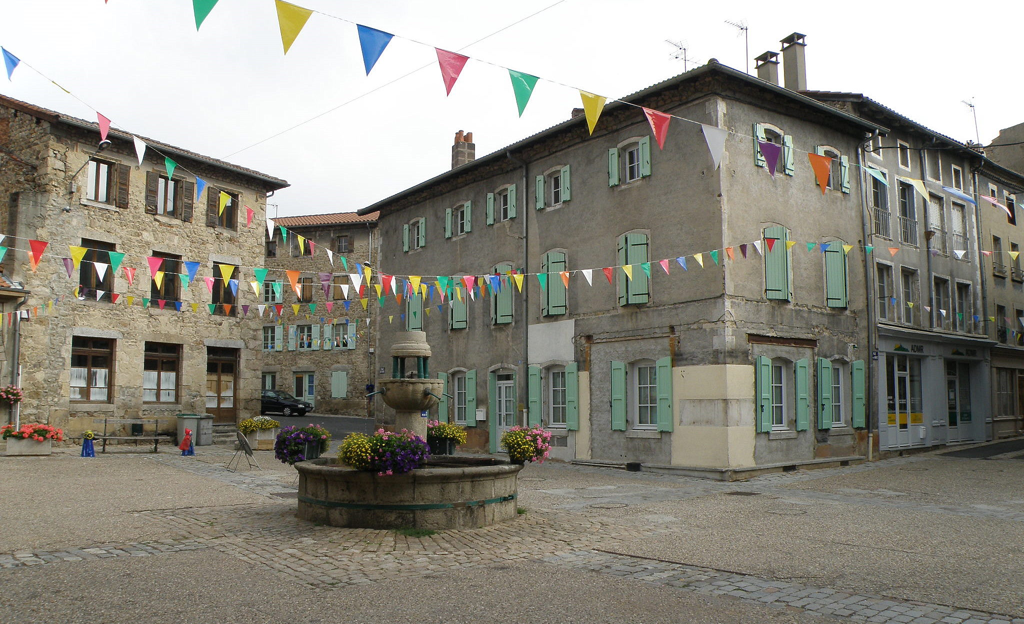 Craponne-sur-Arzon, comm. de la Haute-Loire, France (Auvergne). Place du For, dans le bourg médiéval.